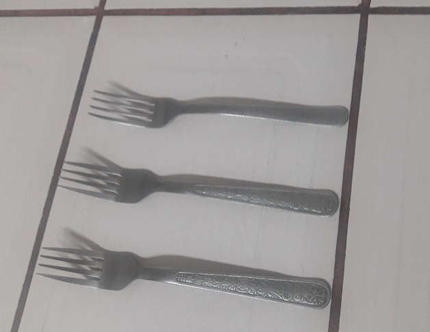 Tenedores de Aluminio